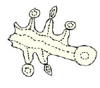 Glifo Nahuatl del municipio de Agua Blanca de Iturbide, Hidalgo